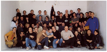 photo de classe